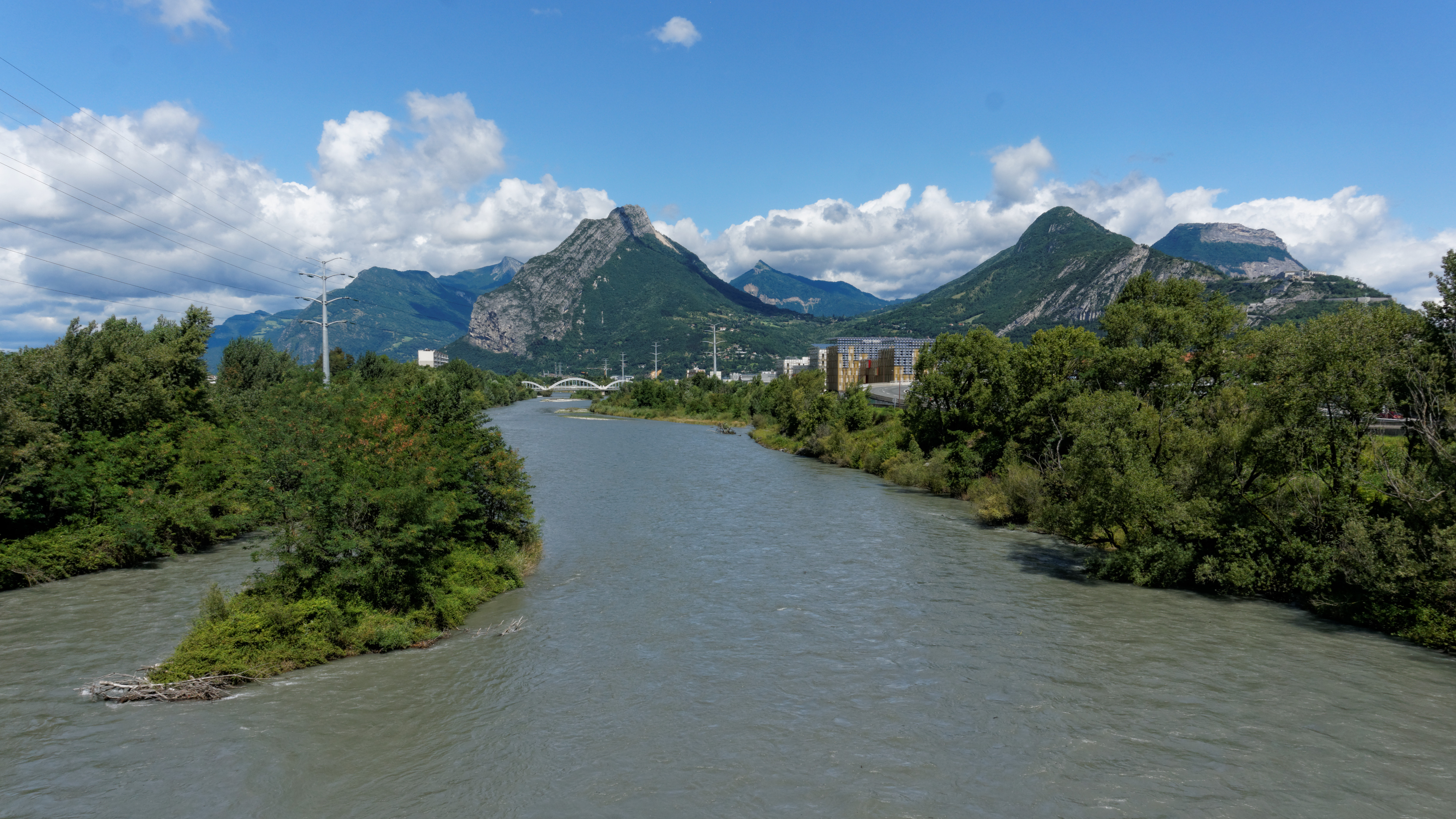 Le Drac à Grenoble en aval du pont de Catane